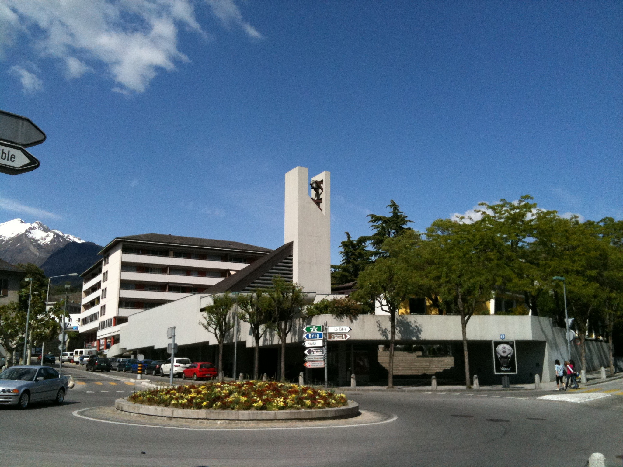 reformierte Kirche Sion, Kanton Wallis